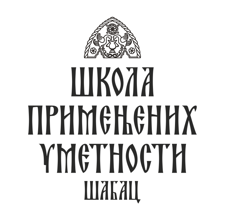 Logo Škole primenjenih umetnosti